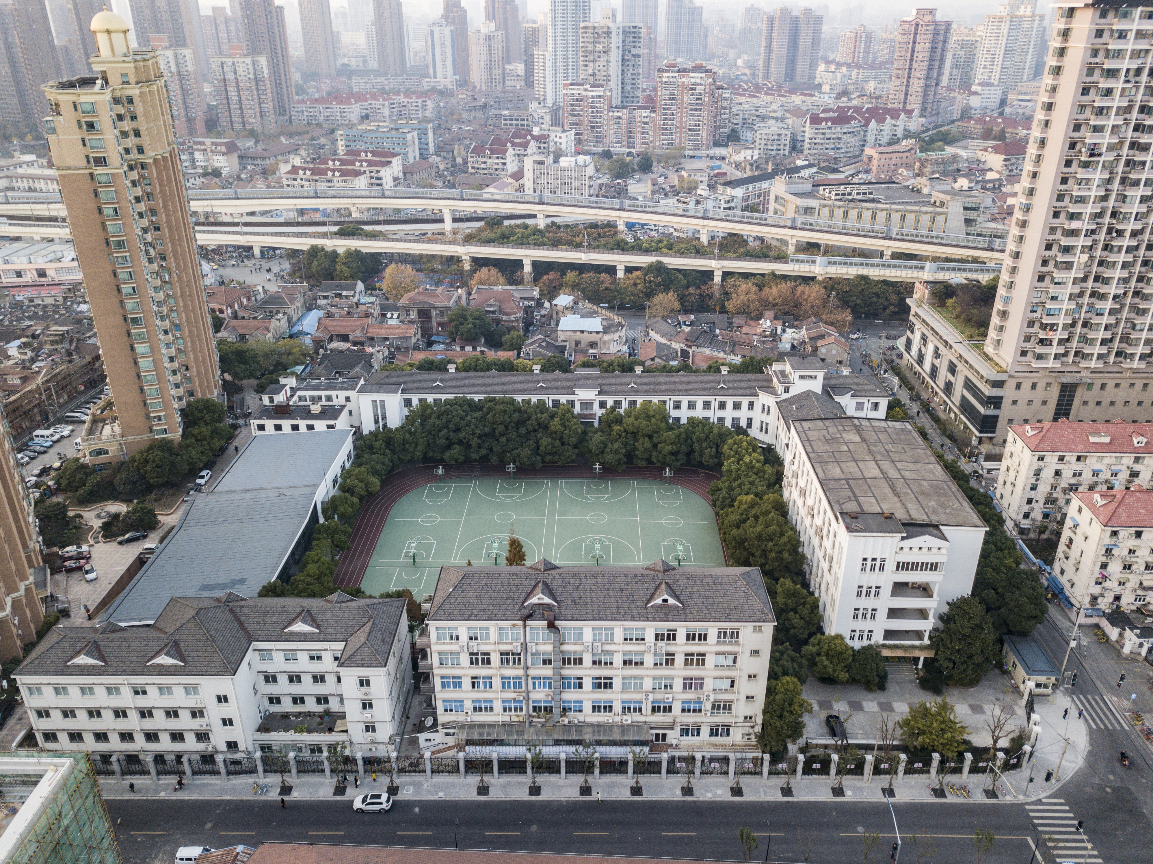 中文（中国大陆）: 师大附中·上海虹口·全景